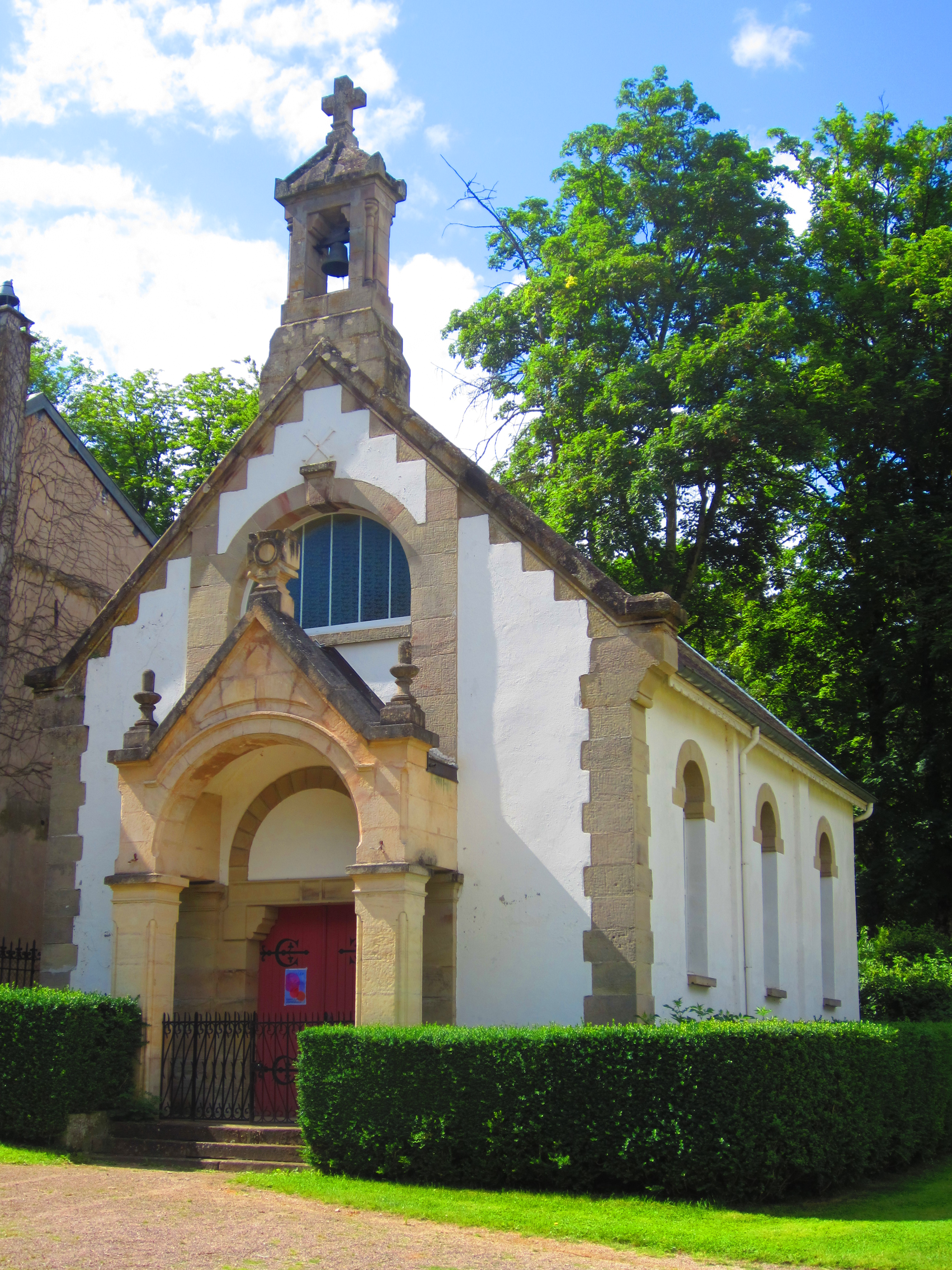 Contrexeville Chapelle anglicane